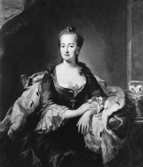 Maria Antonia von Bayern, Kurfürstin von Sachsen